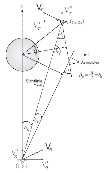 Zur Okkultationsebene